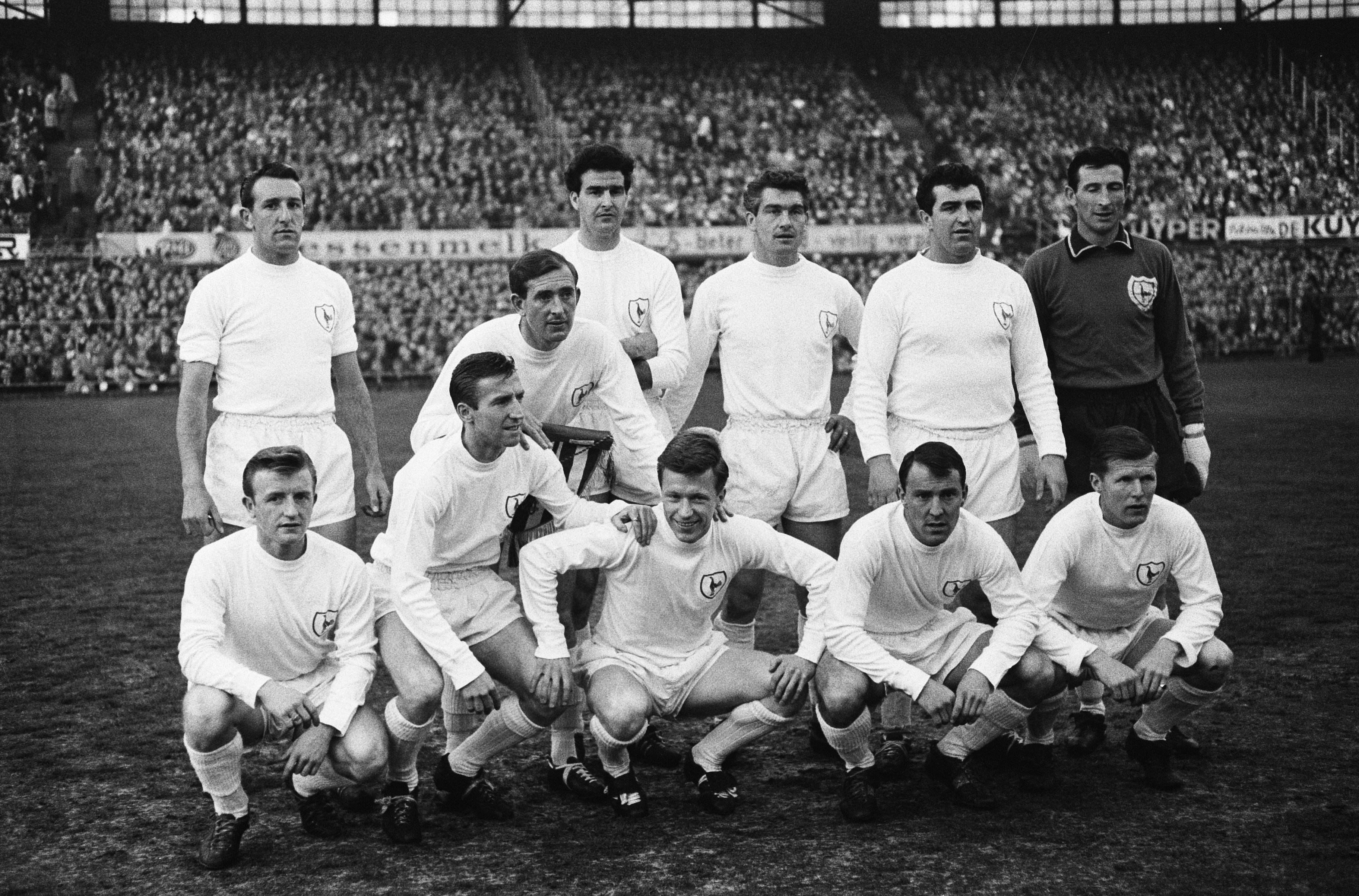 Collectie / Archief : Fotocollectie Anefo Reportage / Serie : [ onbekend ] Beschrijving : Tottenham Hotspurs tegen Atletico Madrid 5-1. Nr. 14 en 15 Elftal Tottenham Hotspurs Datum : 15 mei 1963 Trefwoorden : elftallen, sport, voetbal Instellingsnaam : Tottenham Hotspur Fotograaf : Pot, Harry / Anefo Auteursrechthebbende : Nationaal Archief Materiaalsoort : Negatief (zwart/wit) Nummer archiefinventaris : bekijk toegang 2.24.01.05 Bestanddeelnummer : 915-1586